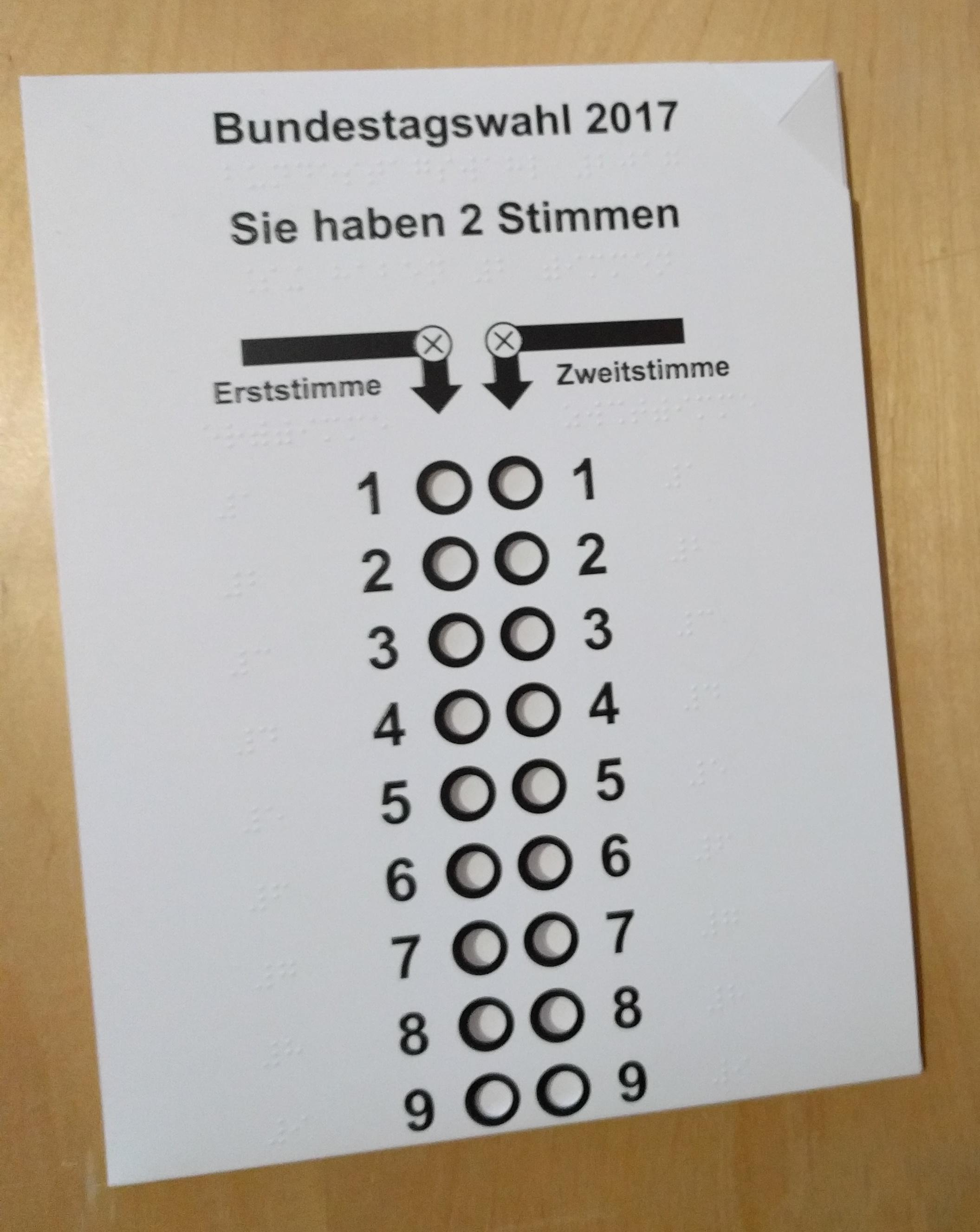 Die obere Hälfte einer Schablone für die Wahl des deutschen Bundestags aus dem Jahr 2017. Der Wahlschein wird von rechts eingelegt. An den Stellen für die Stimmabgabe befinden sich mittig kreisrunde Aussparungen: Je zwei nebeneinander für Erst- und Zweitstimme und insgesamt neun untereinander für die einzelnen Parteien. Für die Zuordnung zu den Kandidaten und Parteien sind links und rechts von den Löchern die Ziffern 1-9 in Blindenschrift und geprägter Schwarzschrift aufgedruckt.